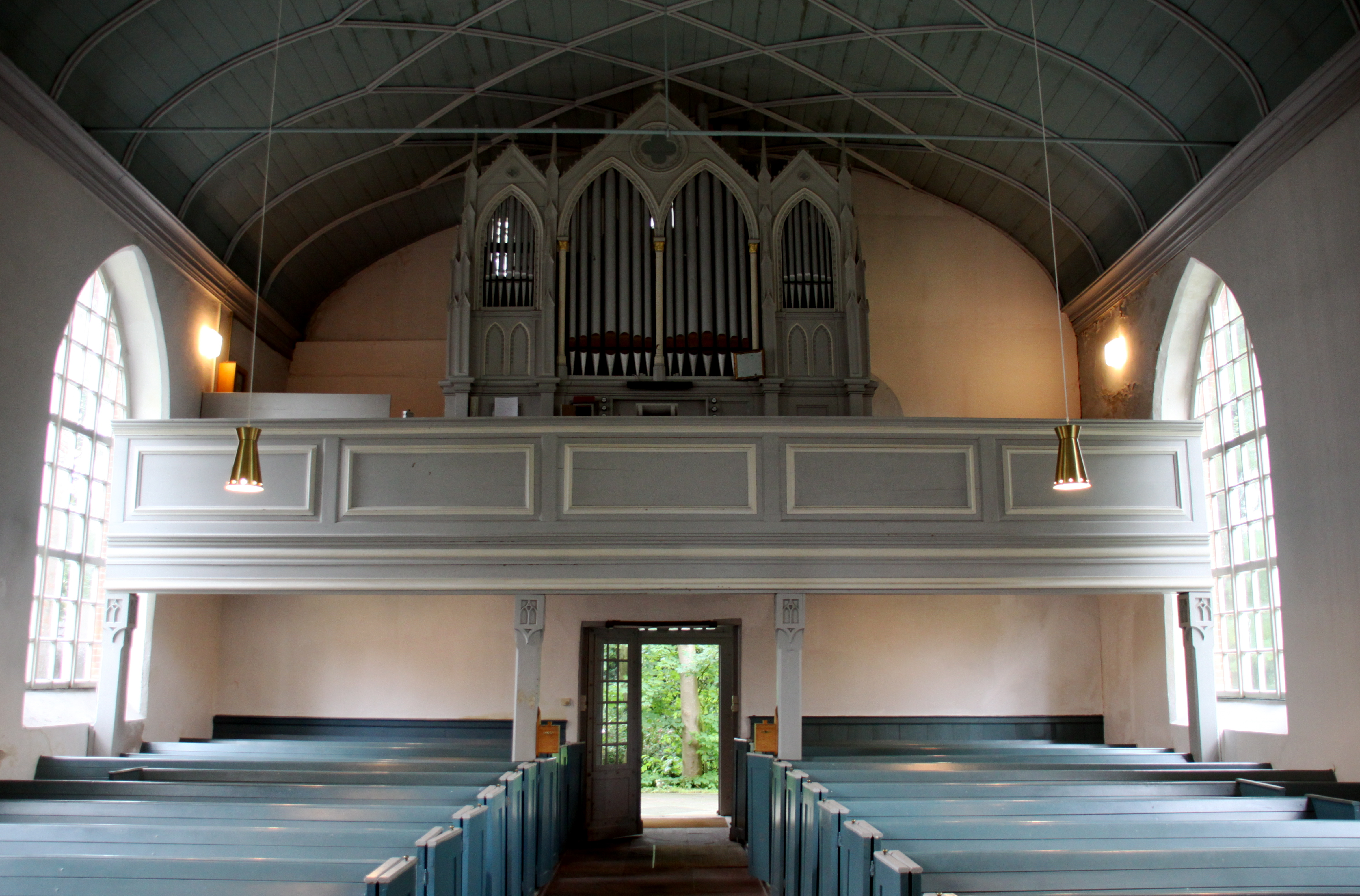 Orgel der Kirche von Loppersum (Hinte)